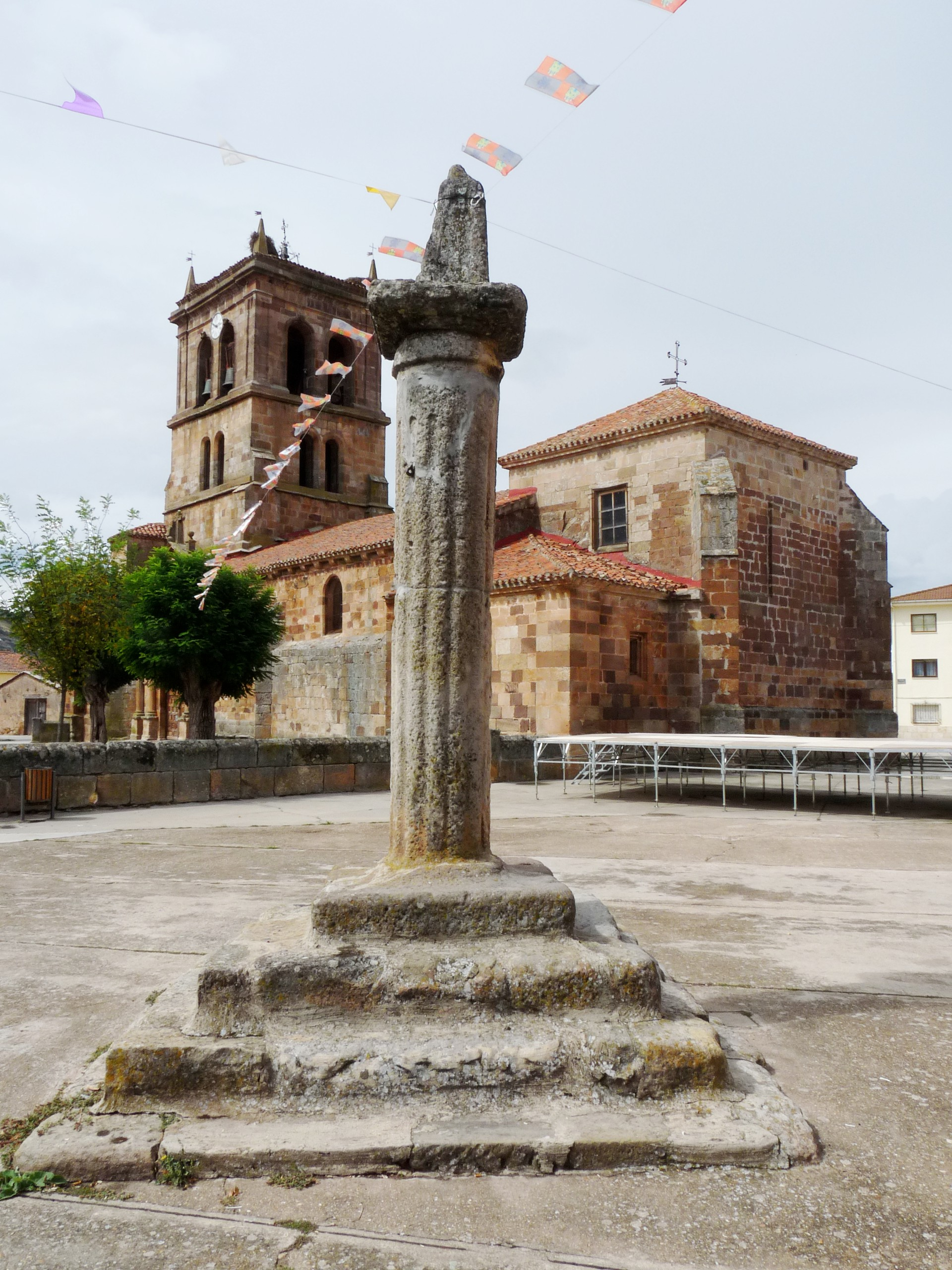 Barbadillo del Mercado - Rollo jurisdiccional (1759) - También sirvió de picota